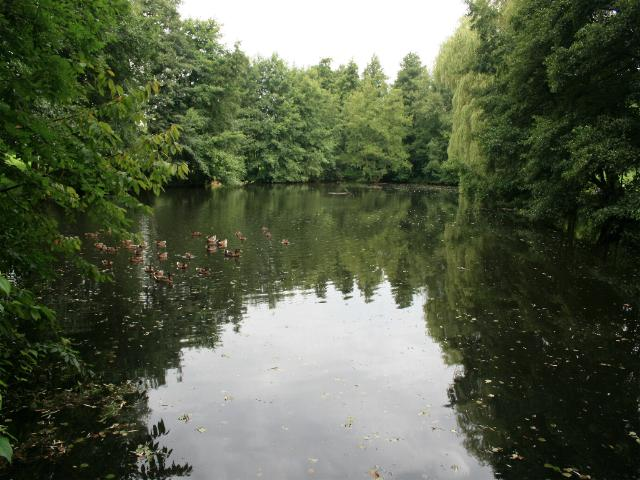 Hier stand einmal die Hausermühle